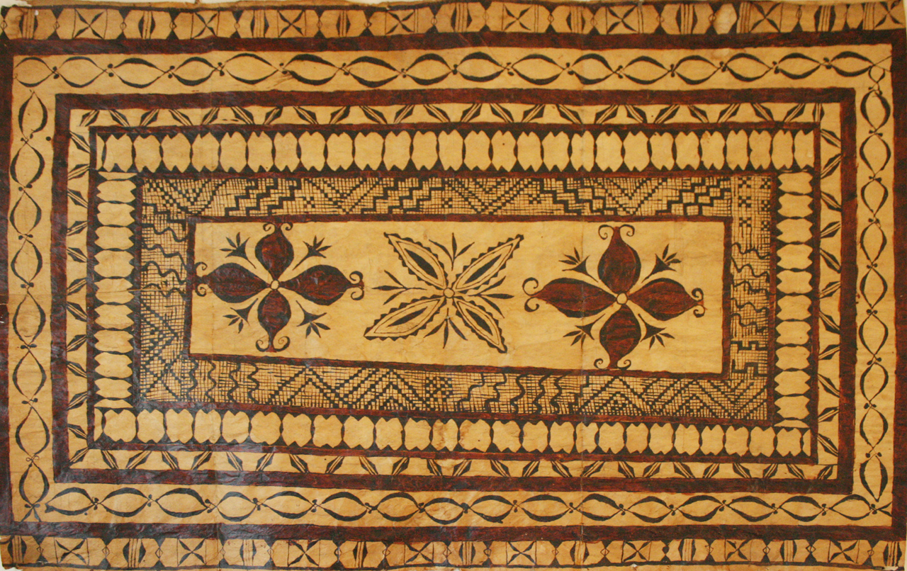 Tapa